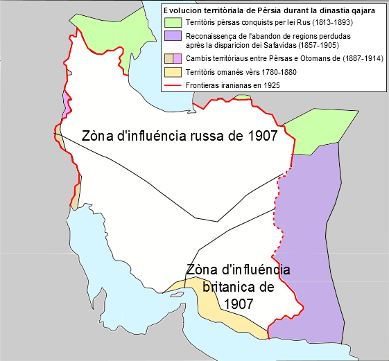 Evolucion dei frontieras iranianas durant la dinastia qajara.